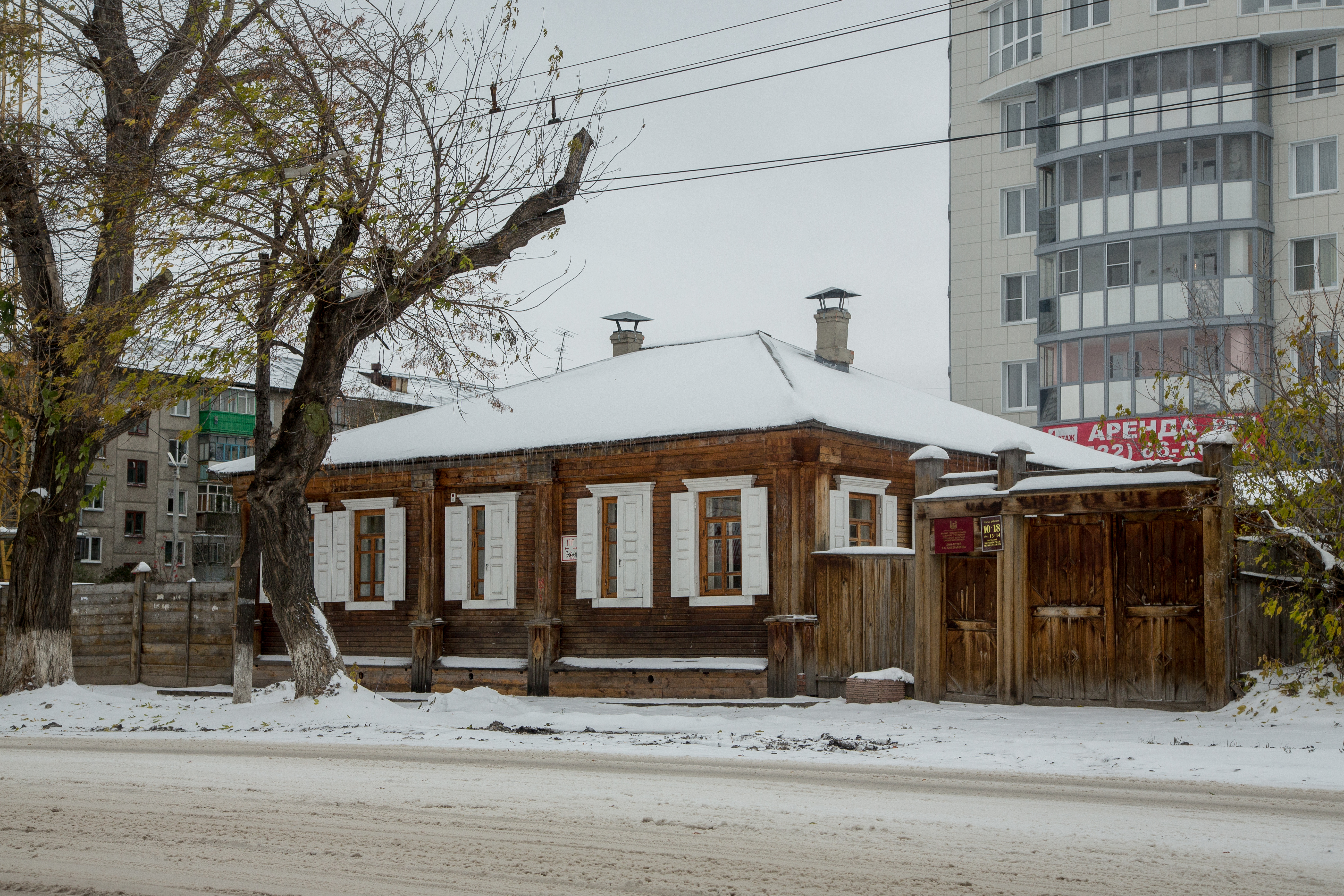 Дом декабриста В.К. Кюхельбекера (Курганская область, Курган, улица Куйбышева, 19)